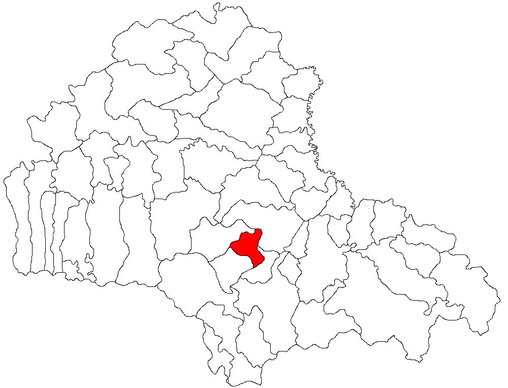 Categorie:Hărţi ale judeţului Braşov